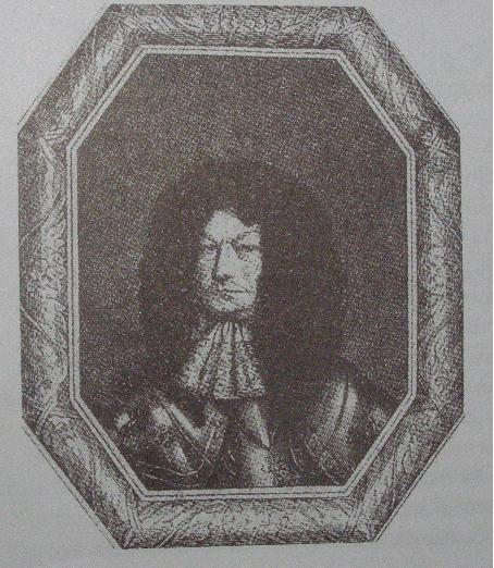 Raimondo Montecuccoli